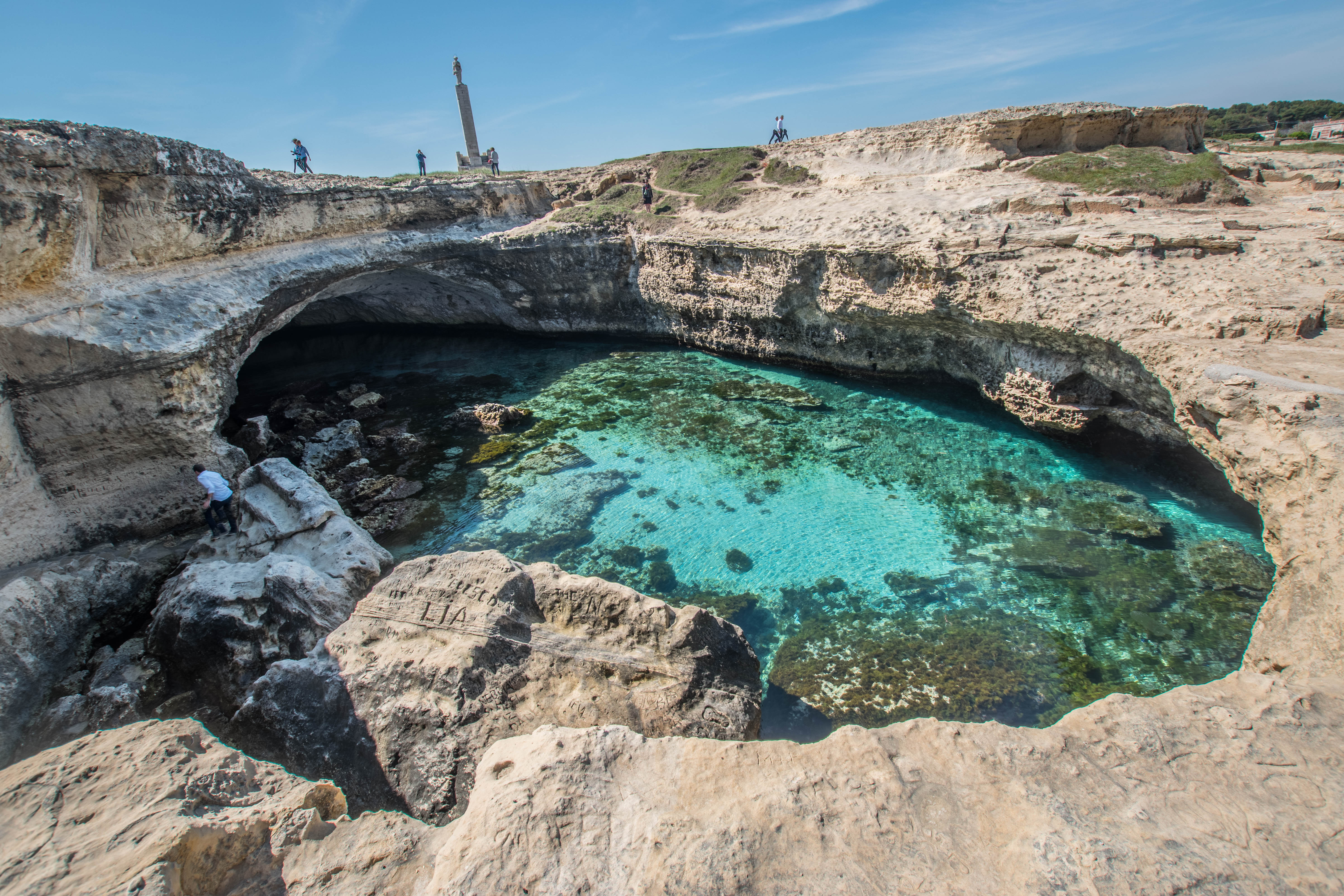 Grotta della Poesia a Roca Vecchia (Melendugno, Puglia, Italia)